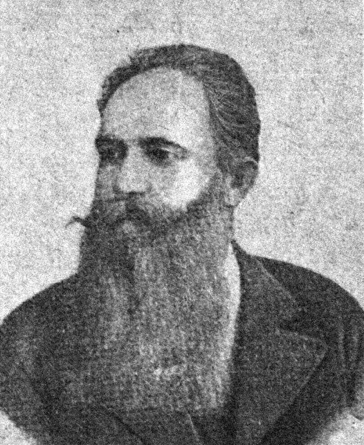 Österreichischer Politiker, Reichsratswahl 1907, Name siehe Dateiname